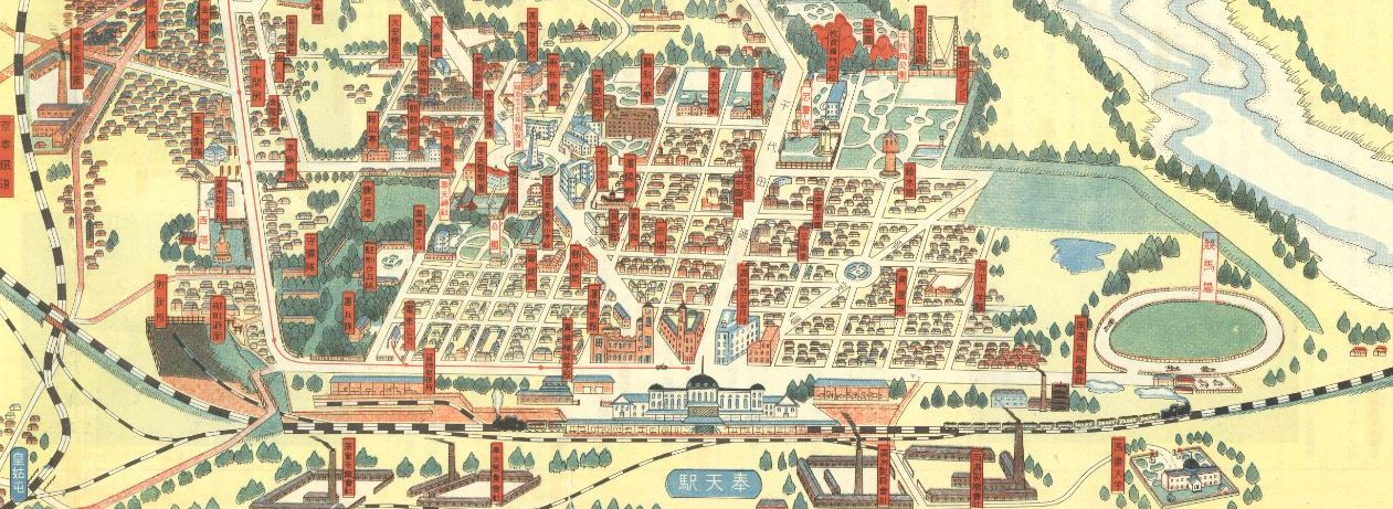 中文（中国大陆）: 奉天名所图绘（附：抚顺名所）